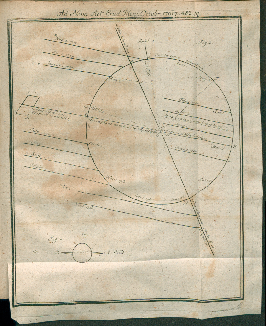 Illustration